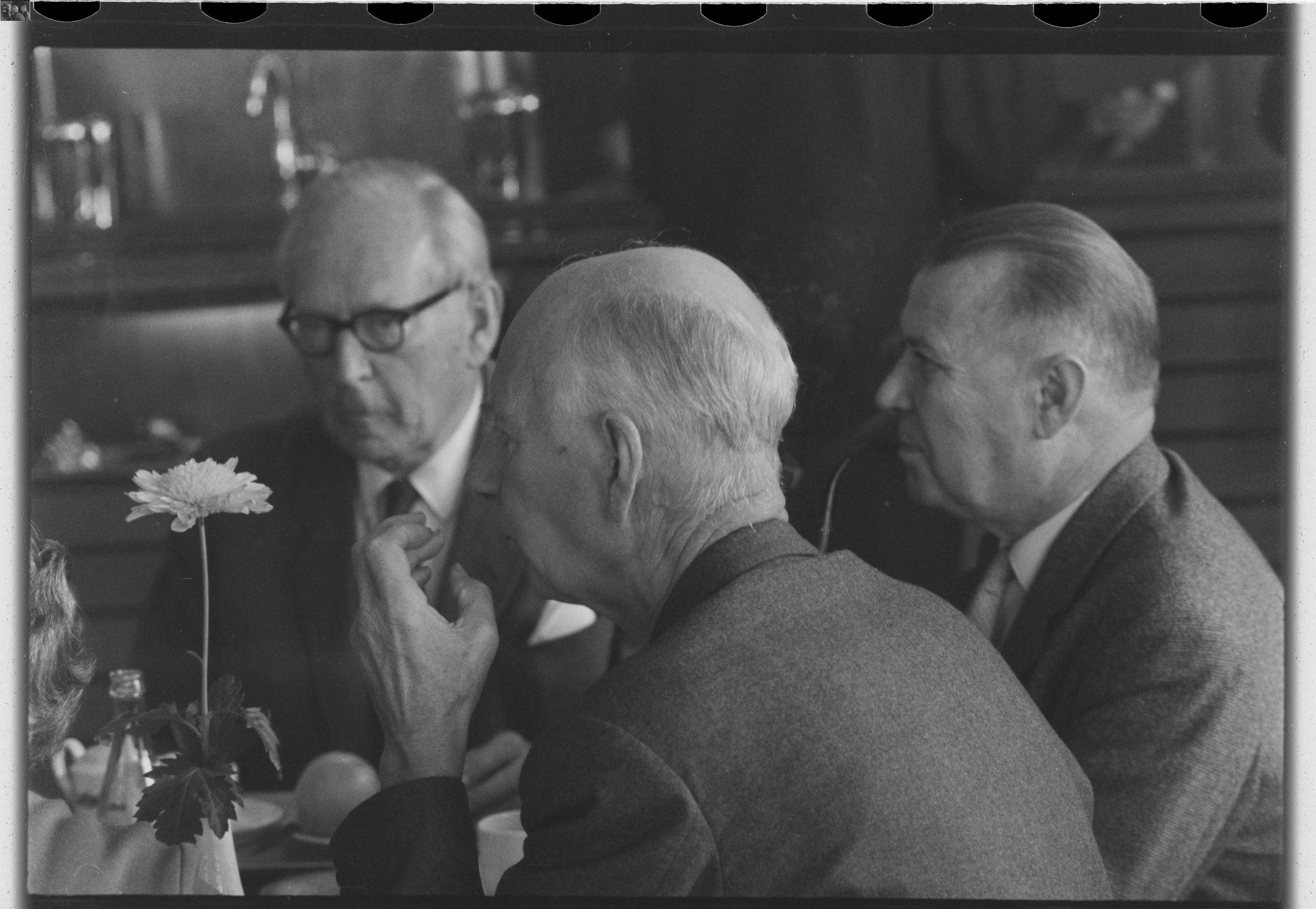 Bildet er hentet fra Arkivverket. Regjeringen Lyngs siste dag, fra debatten i Stortinget Arkivinstitusjon : Riksarkivet Arkivnavn : Billedbladet NÅ Sted : Norge, Oslo, Oslo, Stortinget Emneord: Regjeringer, Lyng Avbildet